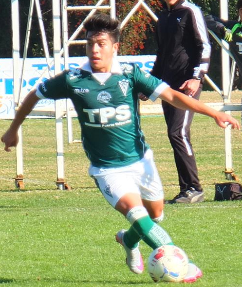 Fotografía del jugador de fútbol Yerko Muñoz en el Santiago Wanderers.